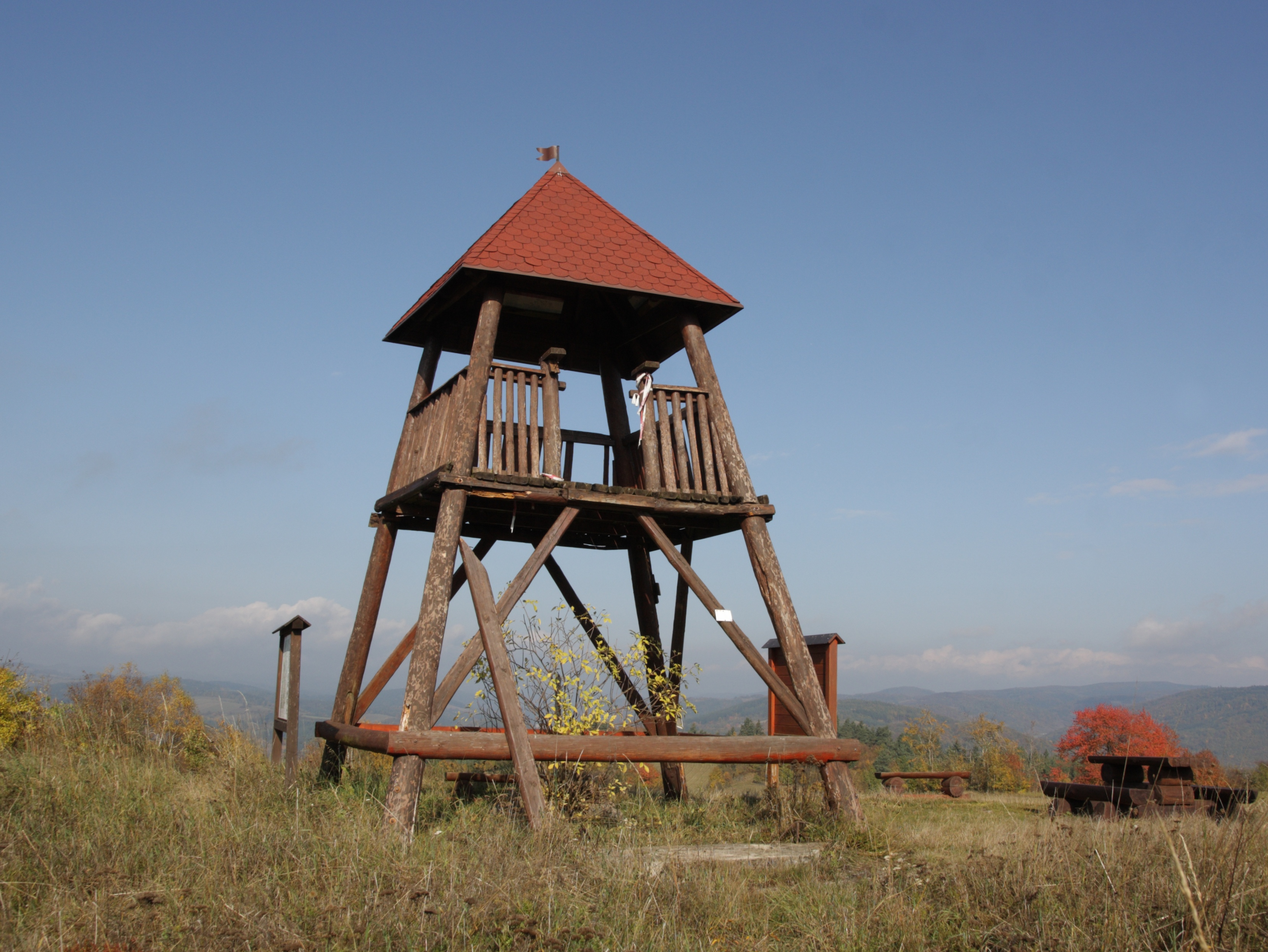 Kaly - rozhledna Babylon (2016).